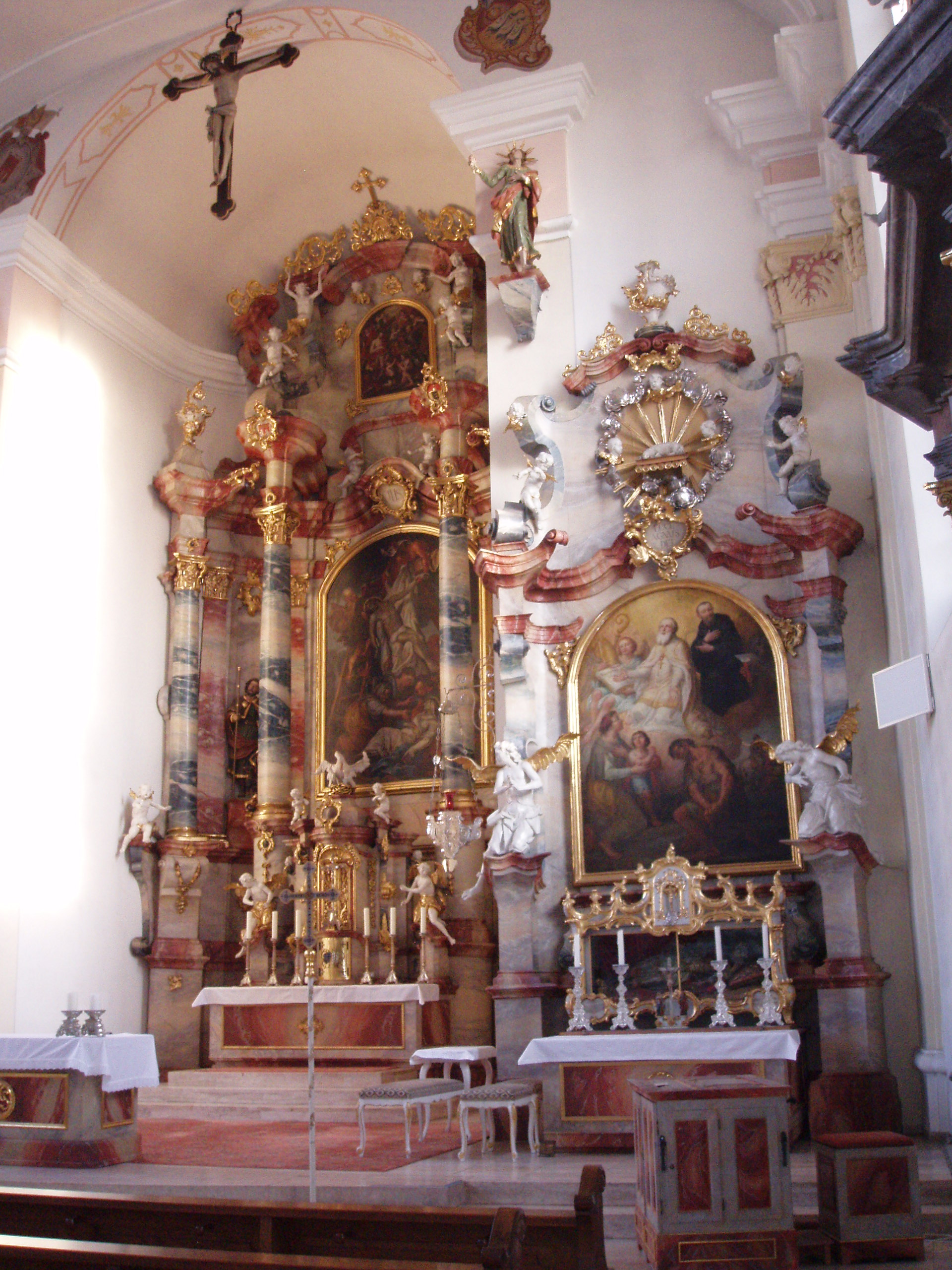 Pfarrkirche St. Martin in Langenargen